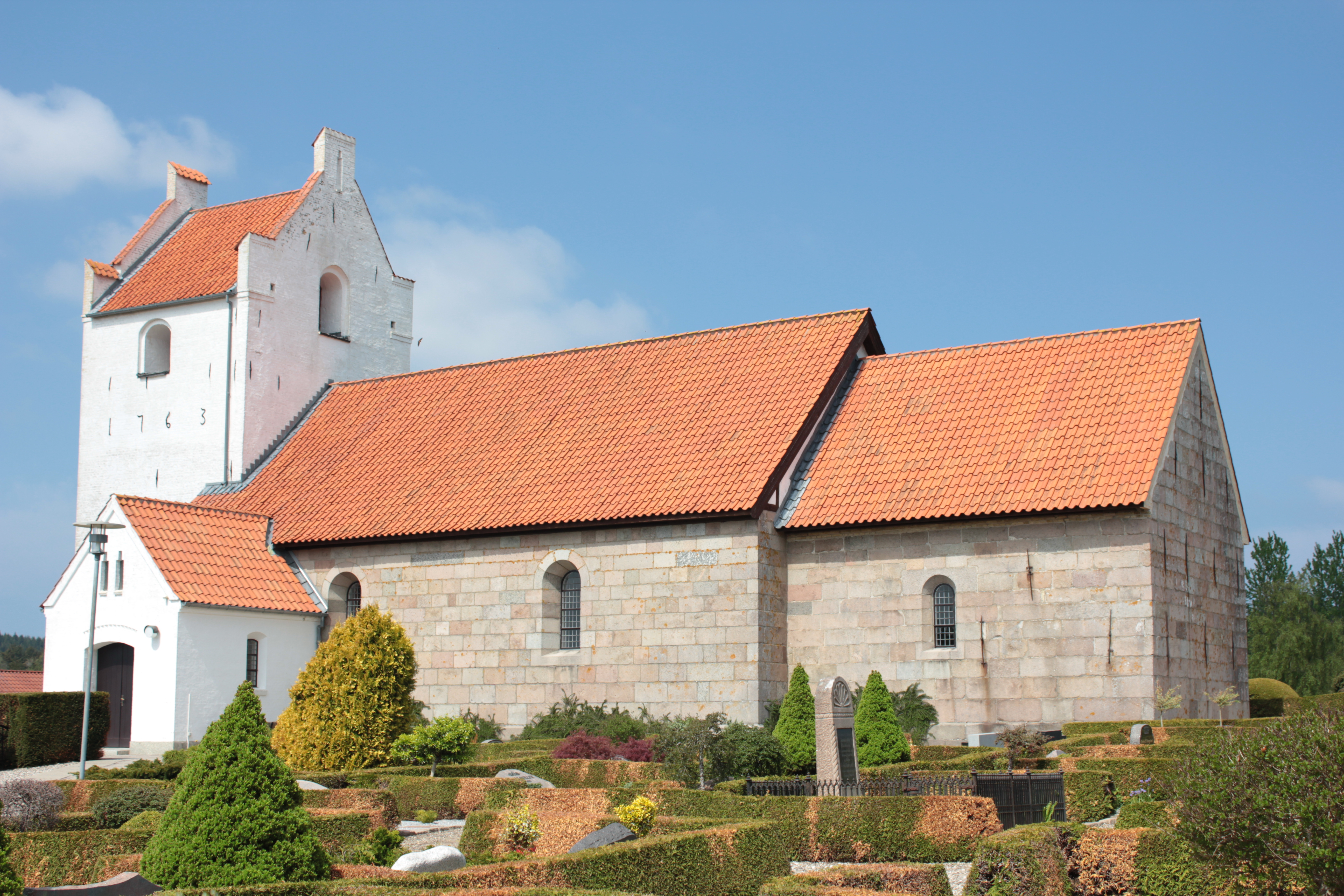 Tranum Kirke